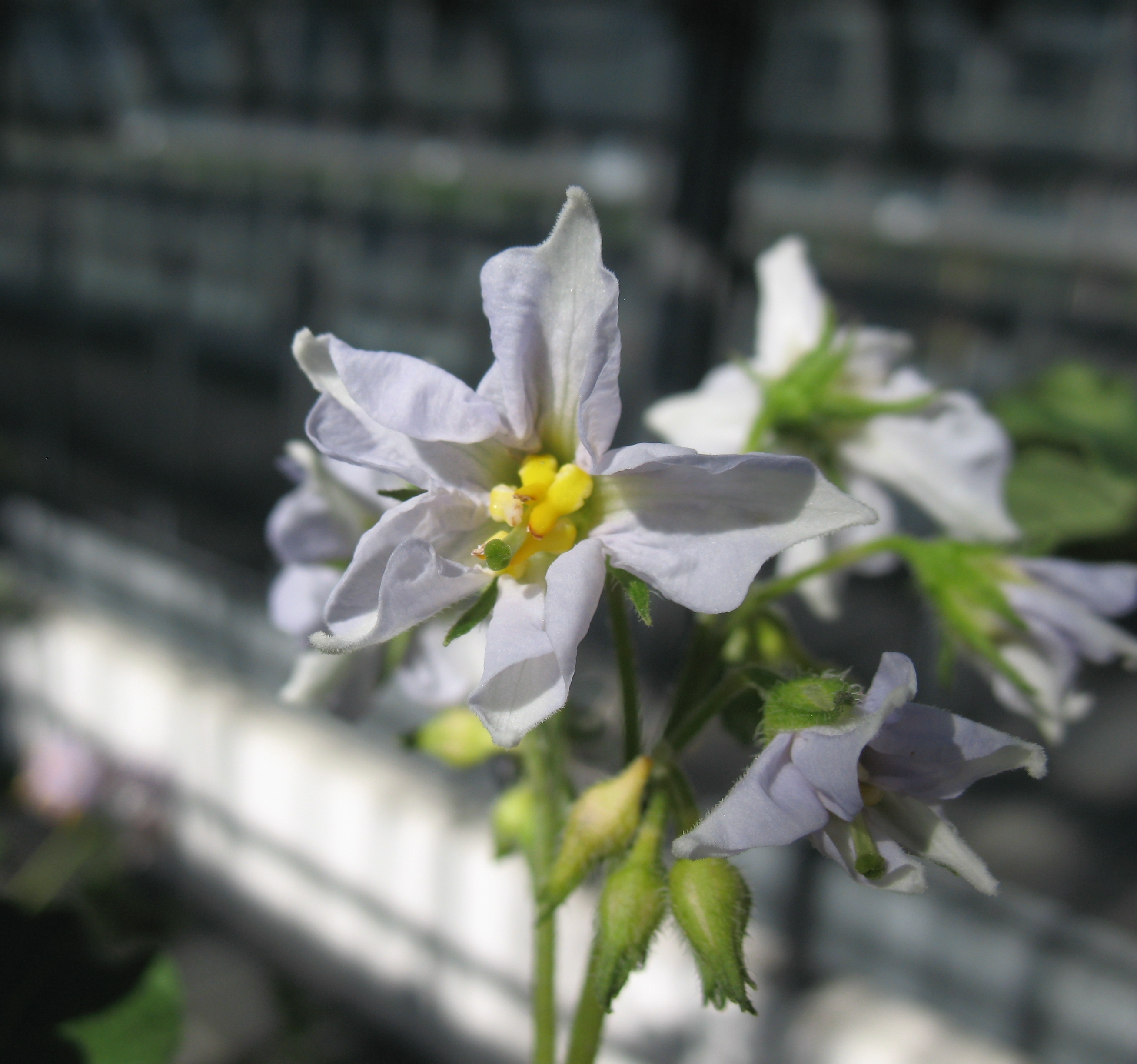 Blüten der Kartoffelsorte Schwarzblaue aus dem Frankenwald